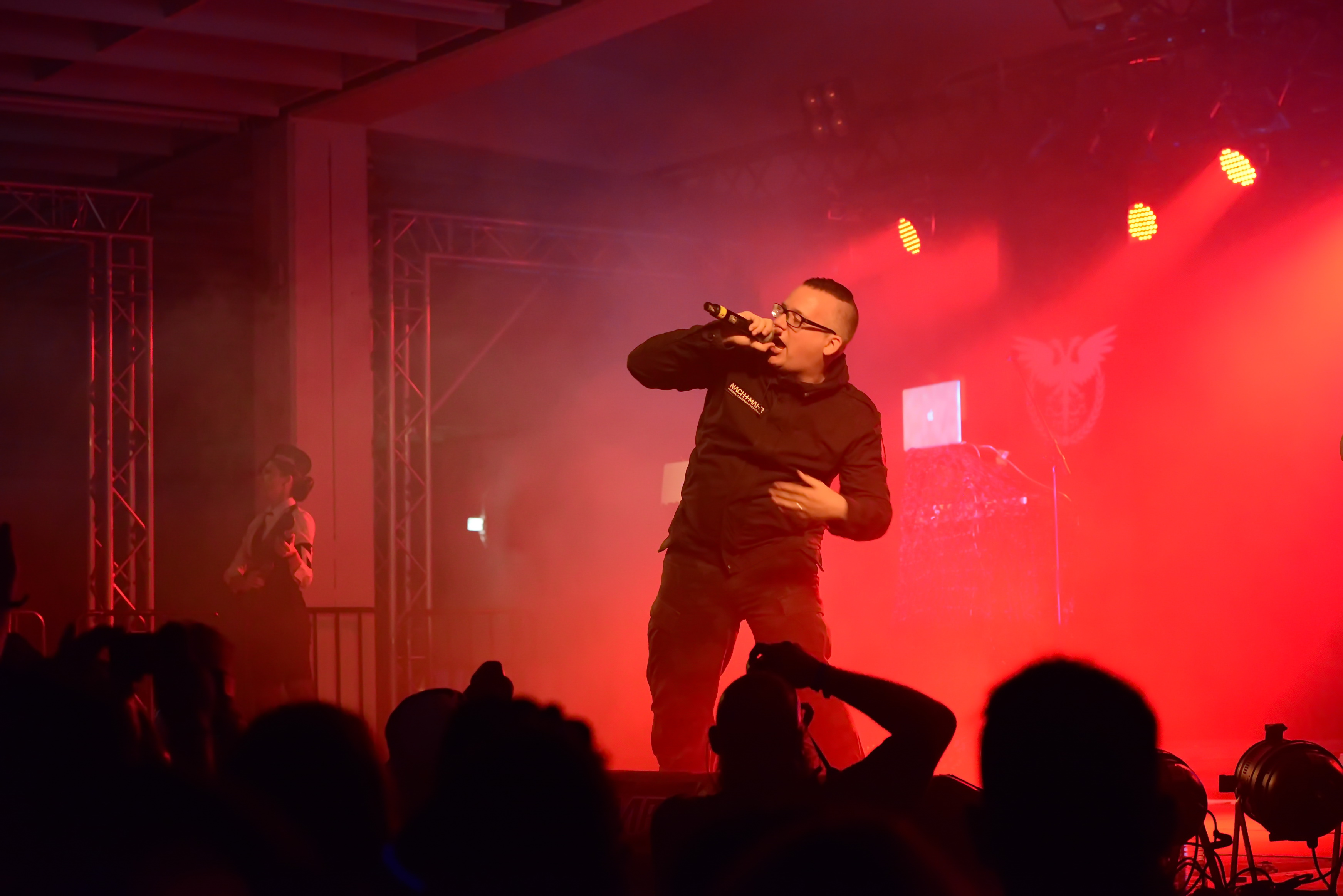 Nachtmahr, Amphi festival 2014